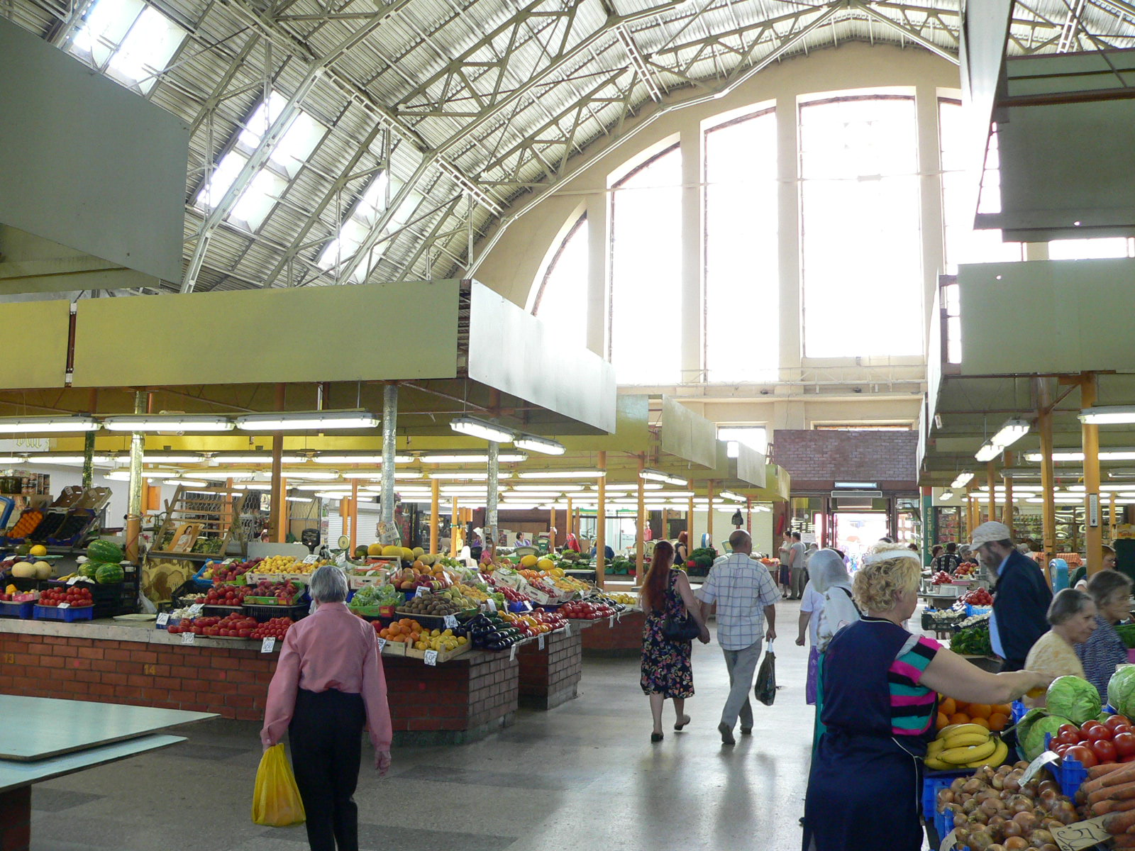 Riga Lettonie - le marché couvert